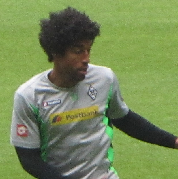 Dante Bonfim Costa Santos